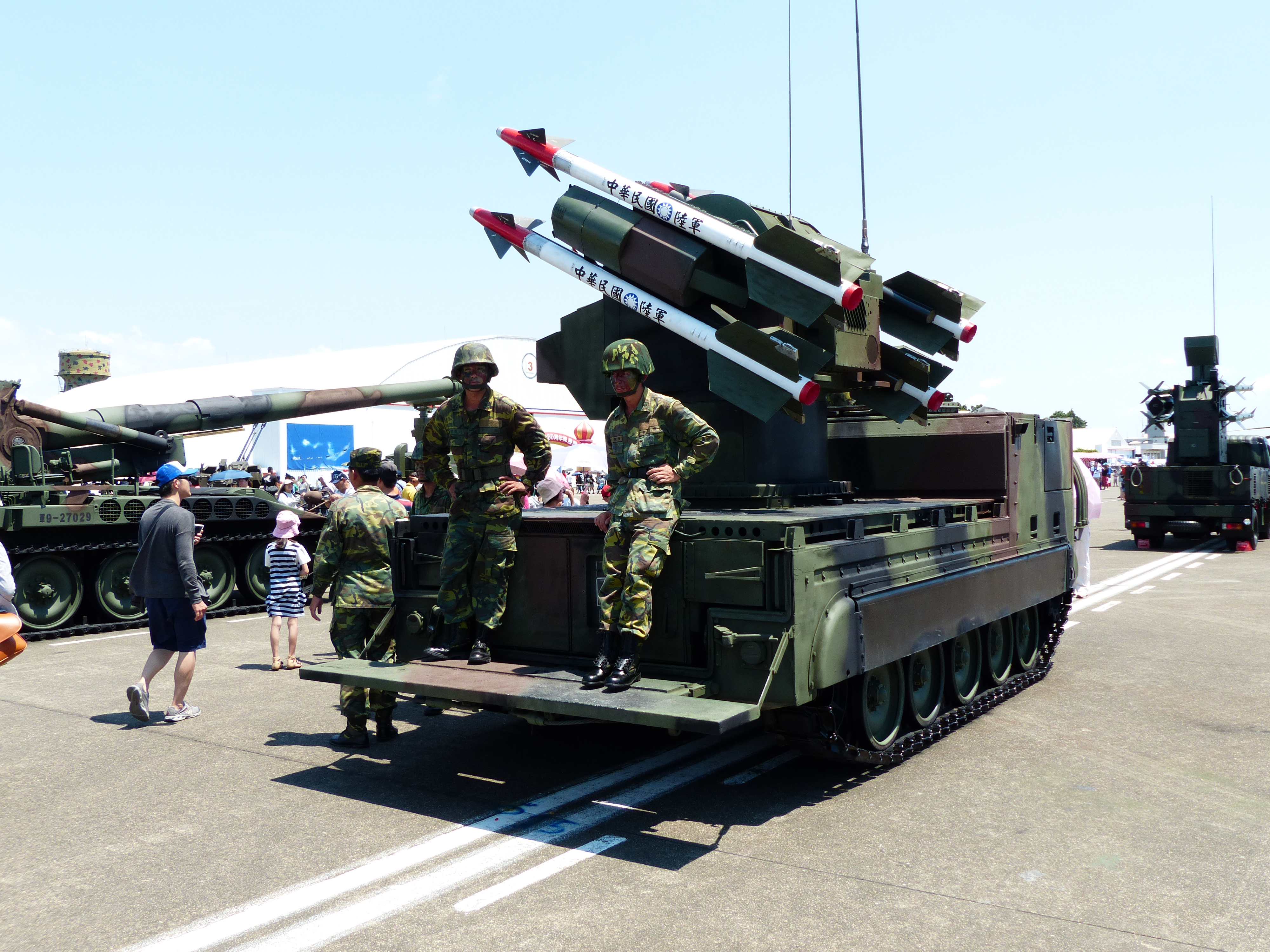 2013年臺南空軍基地營區開放活動，展示之陸軍M730A1檞樹飛彈車與車尾載臺上的士兵。